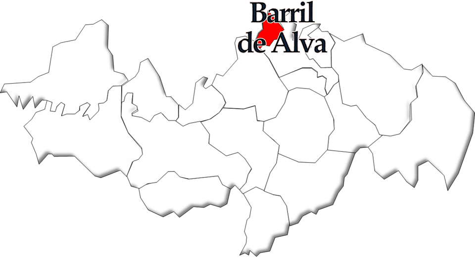 População